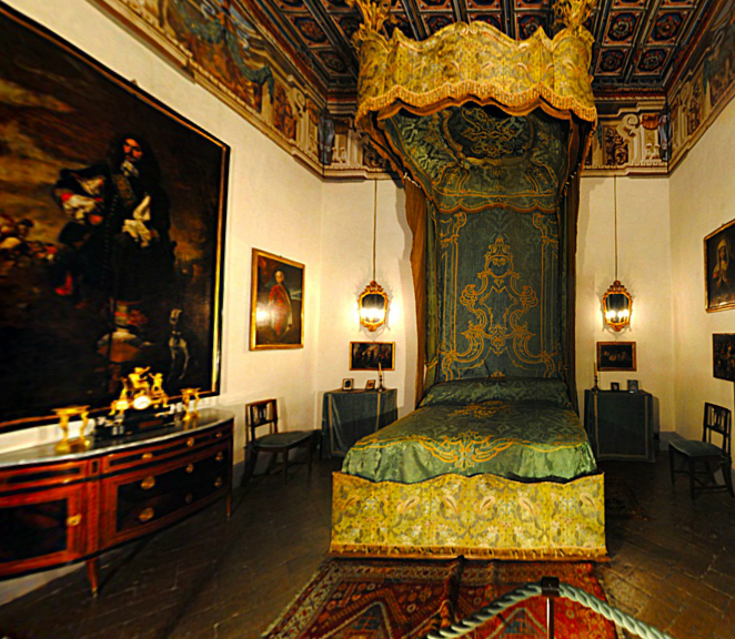 Stanza della camera verde - Villa Della Porta Bozzolo (VA) - Italia